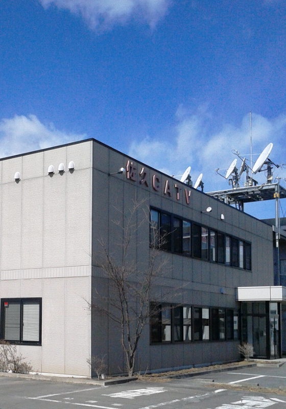 佐久ケーブルテレビ株式会社